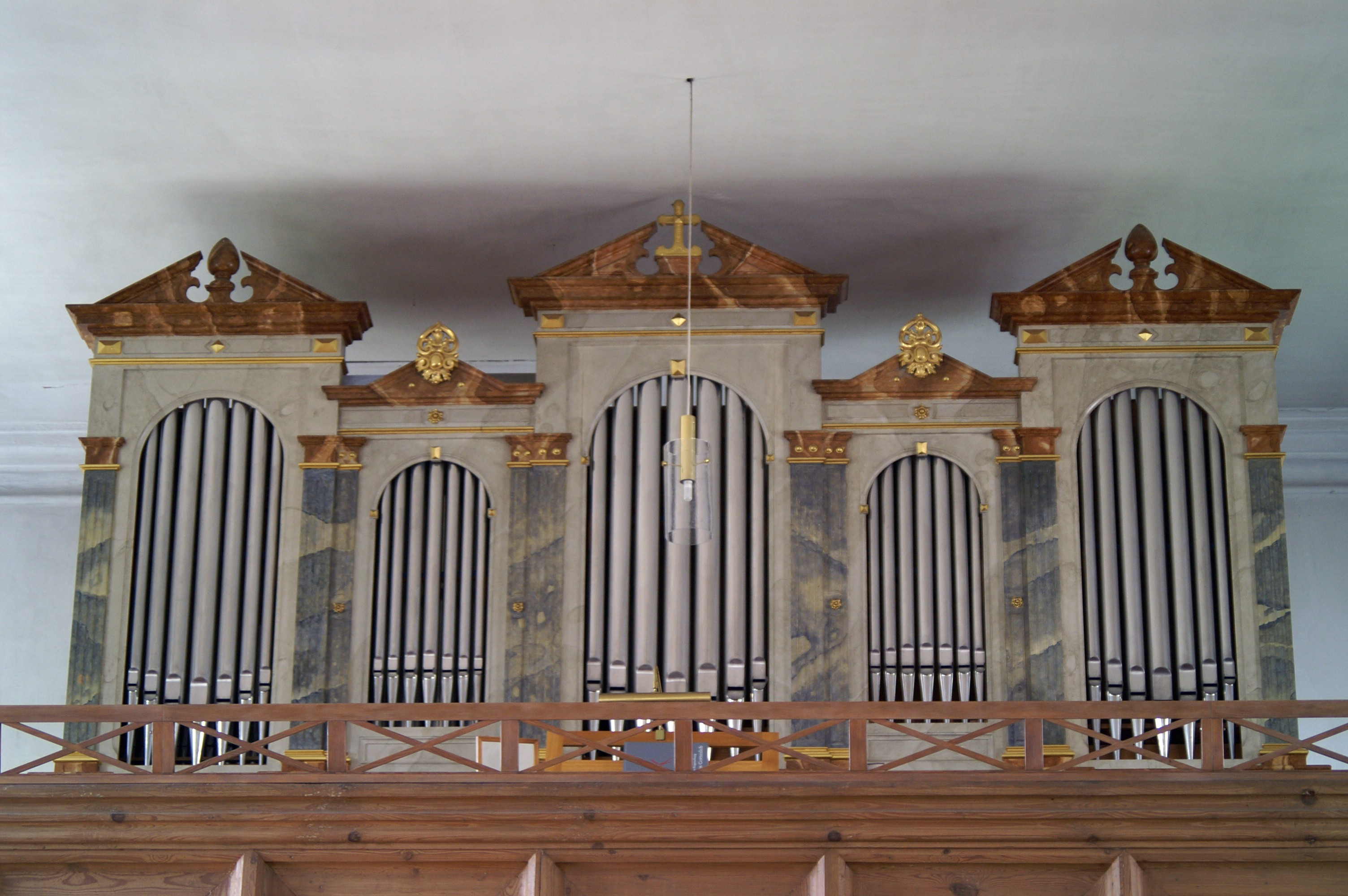 Orgel der Kirche in Brennberg